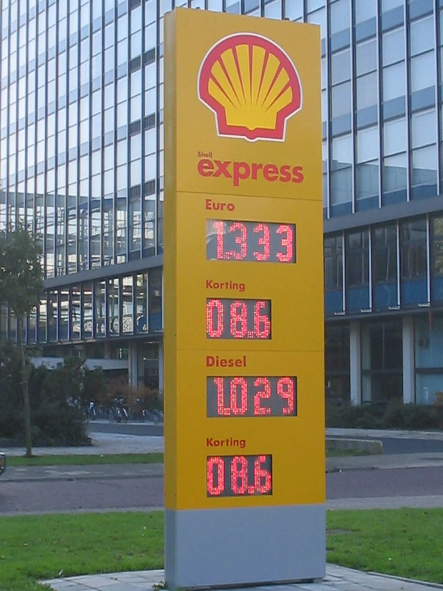 Shell Express, Delft, 15 oktober Categorie:Wikipedia:Afbeeldingen/Gebruiker:Michiel1972